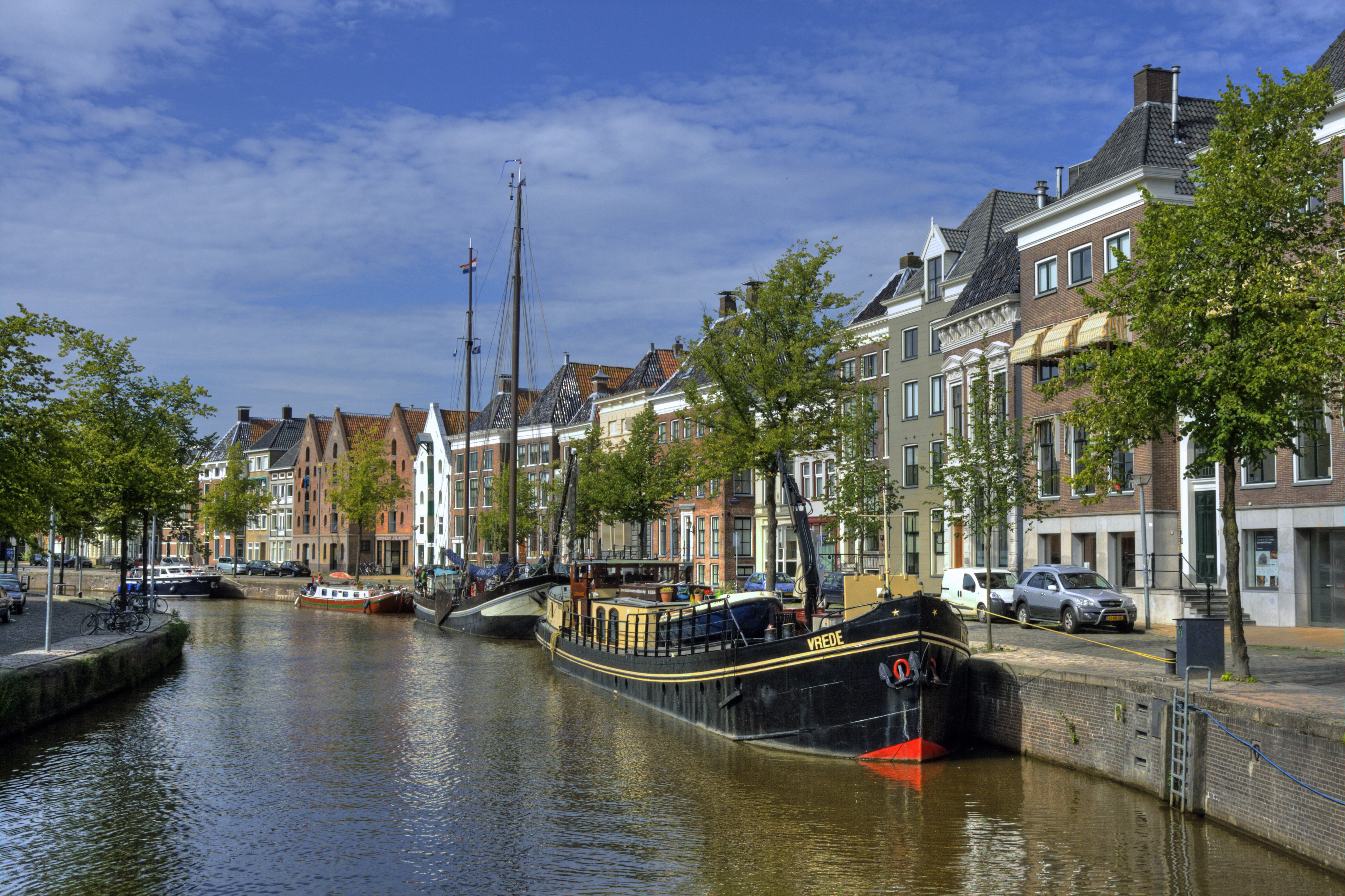 Hoge der A gezien vanaf de A-brug (Groningen, Nederland)